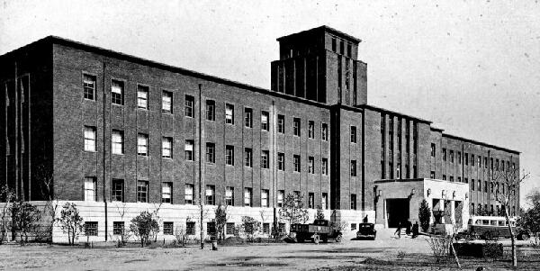 中文（中国大陆）: 奉天市政公署大楼